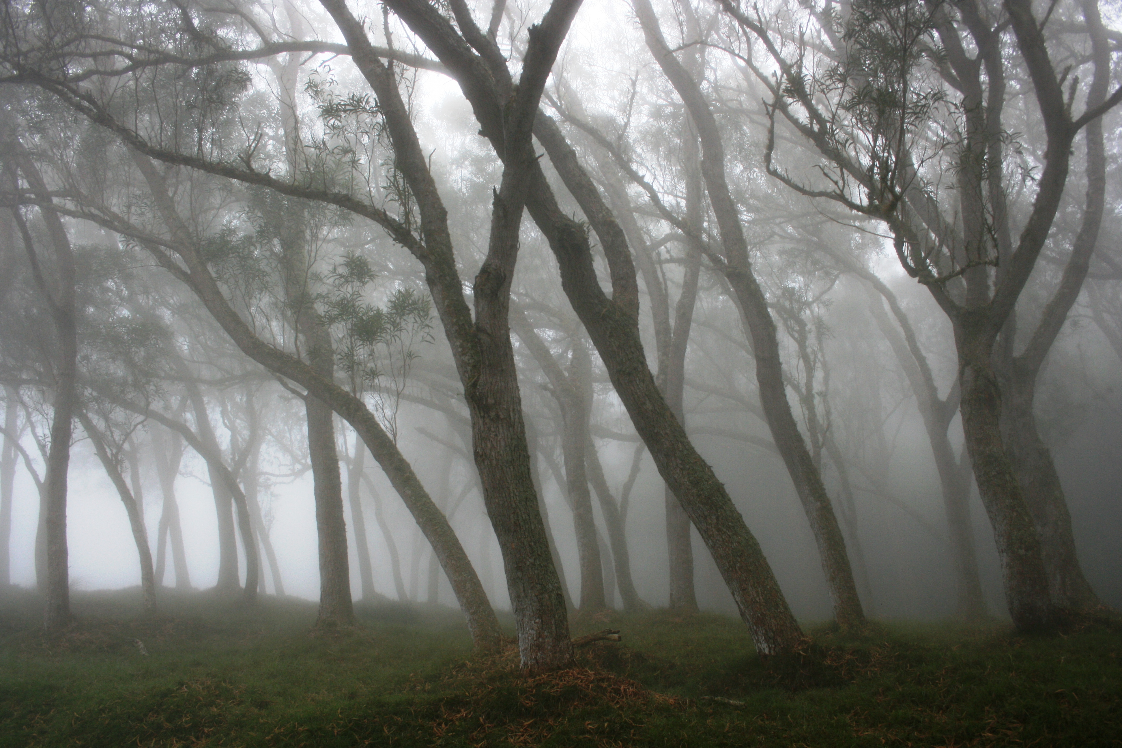 Troncs d'arbres baignés par le brouillard dans la forêt des Hauts-sous-le-Vent, à Saint-Paul de La Réunion.